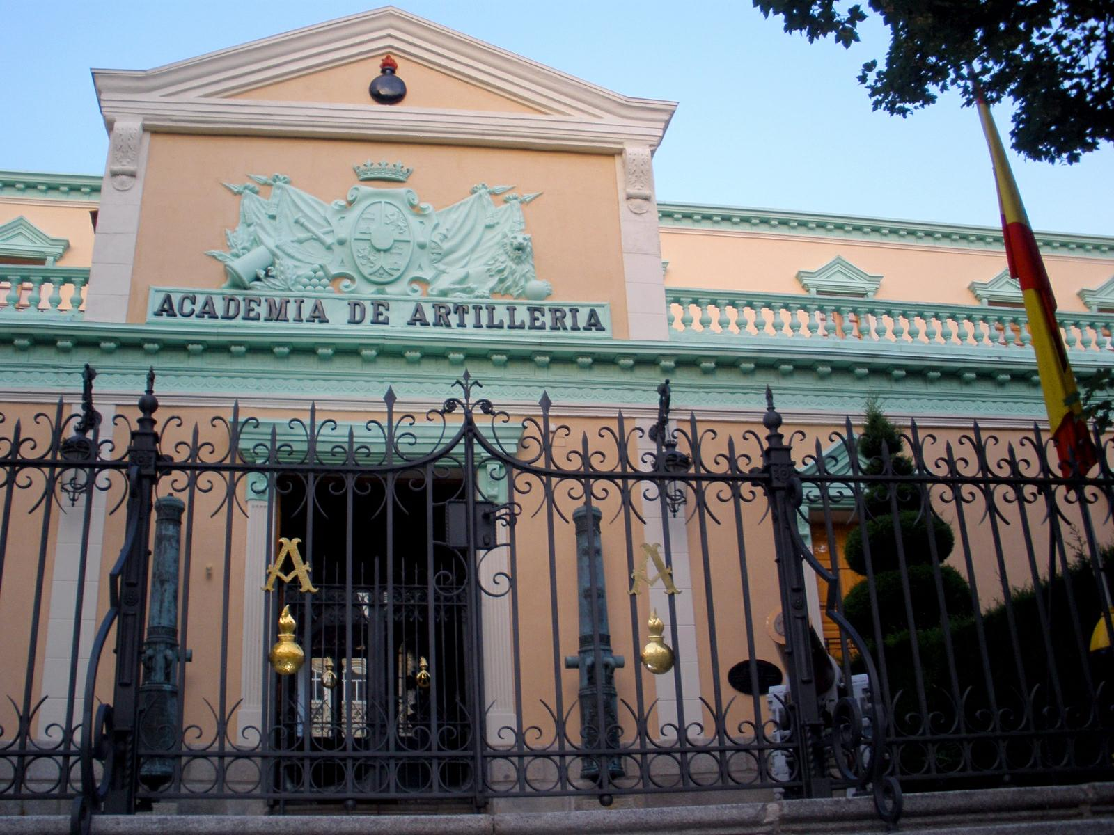 Academia de Artillería de Segovia (Castilla y León, España).